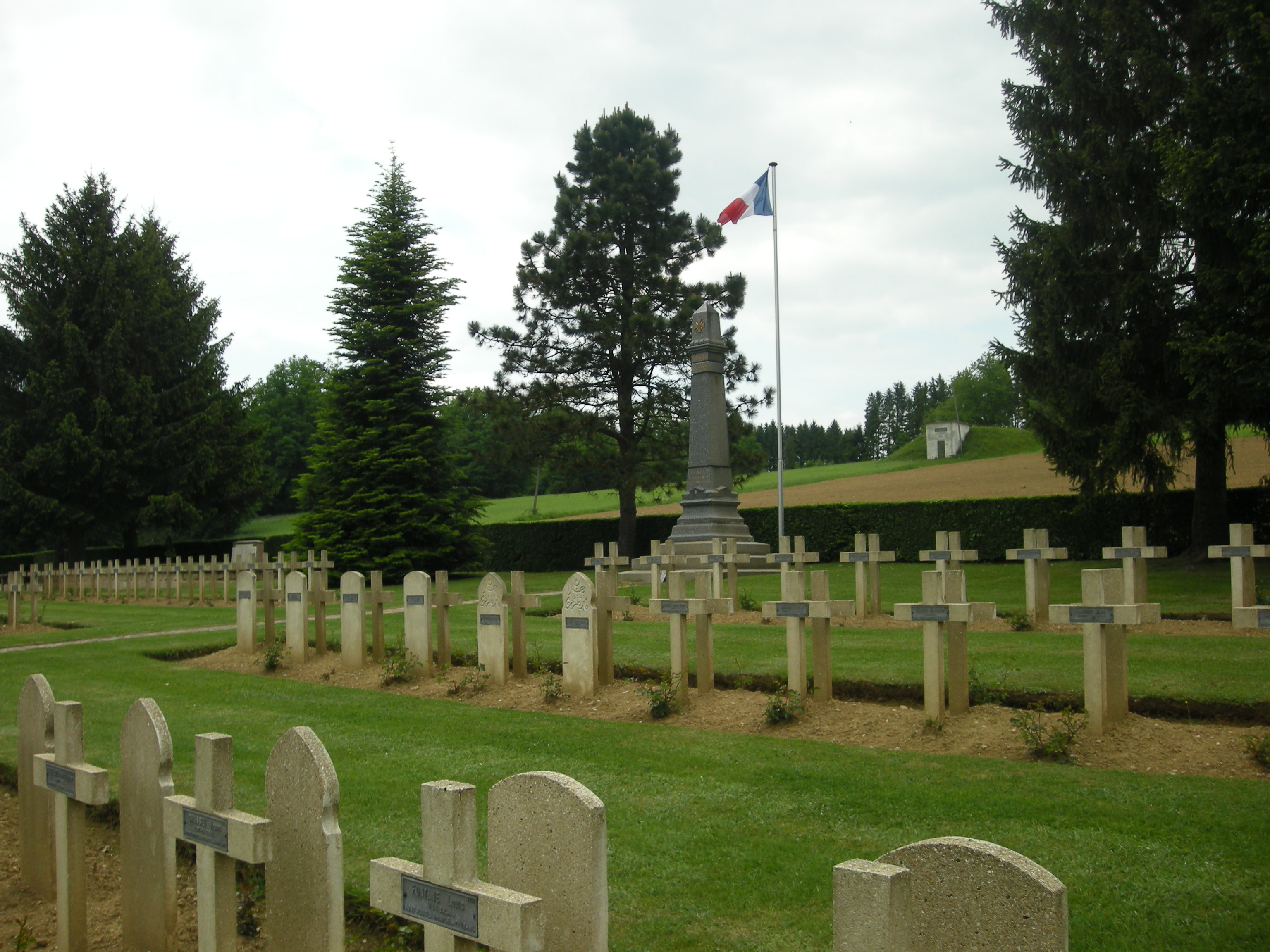 Nécropole nationale de Saulcy-sur-Meurthe (Vosges)